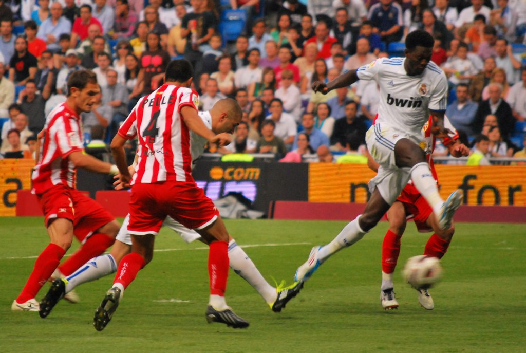 Emmanuel Adebayor et Karim Benzema lors d'un match entre le Real Madrid et l'UD Almería.